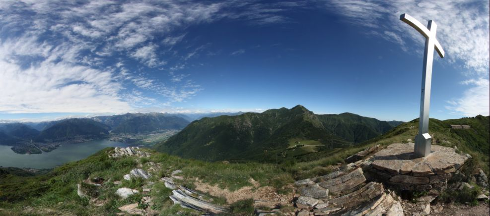 Panoramica dal Monte Gambarogno